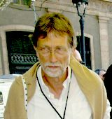 Autor: Salvador Badiella